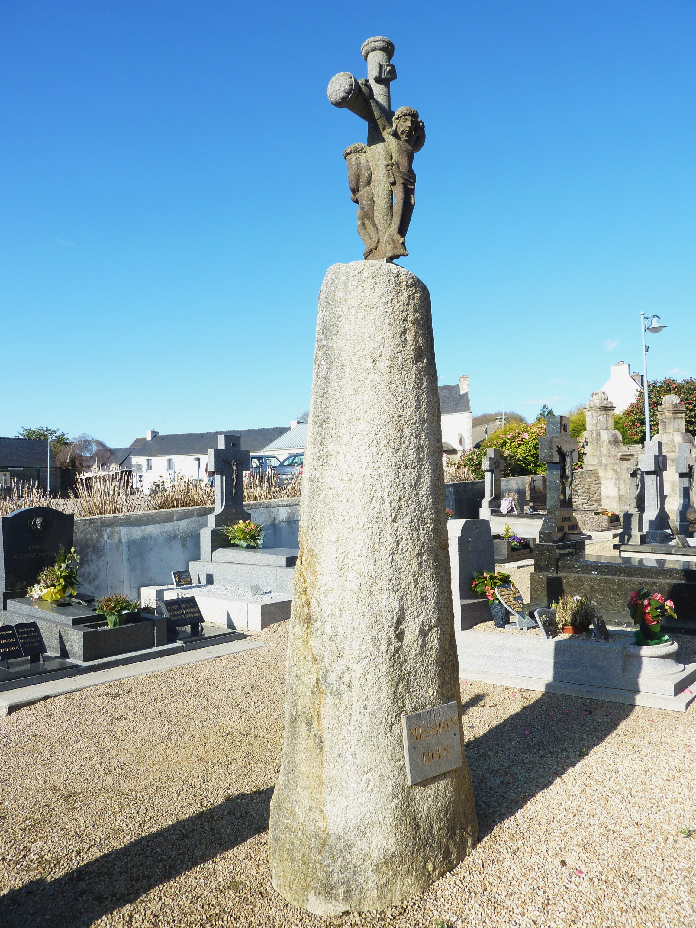 Loc-Eguiner-Saint-Thégonnec : stèle de l'âge du fer christianisée (déplacée le long de la voie romaine où elle fut retrouvée) et replacée dans l'enclos paroissial